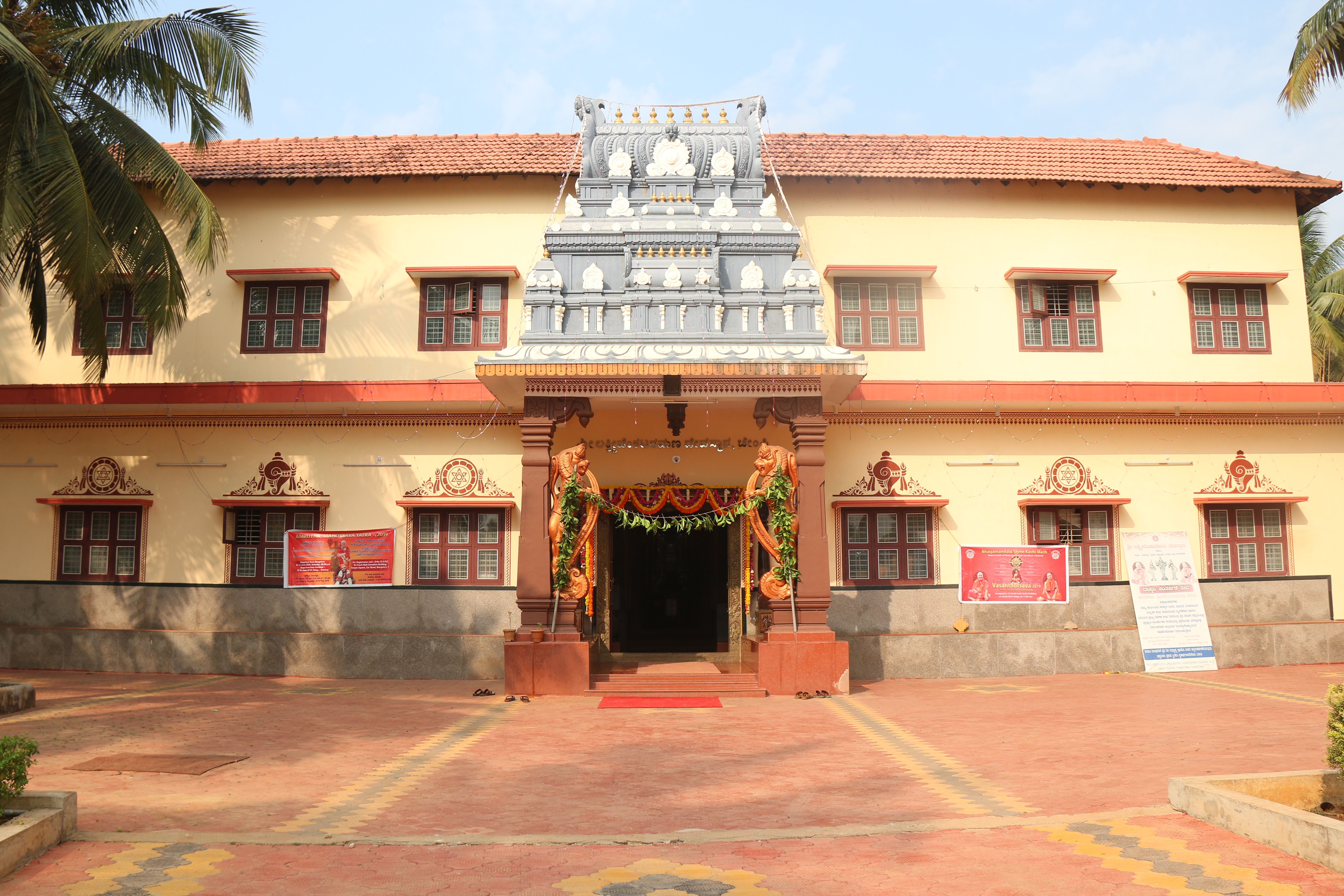 ಕನ್ನಡ: ಚೇಂಪಿ ಲಕ್ಷ್ಮೀ ವೆಂಕಟರಮಣ ದೇವಸ್ಥಾನ